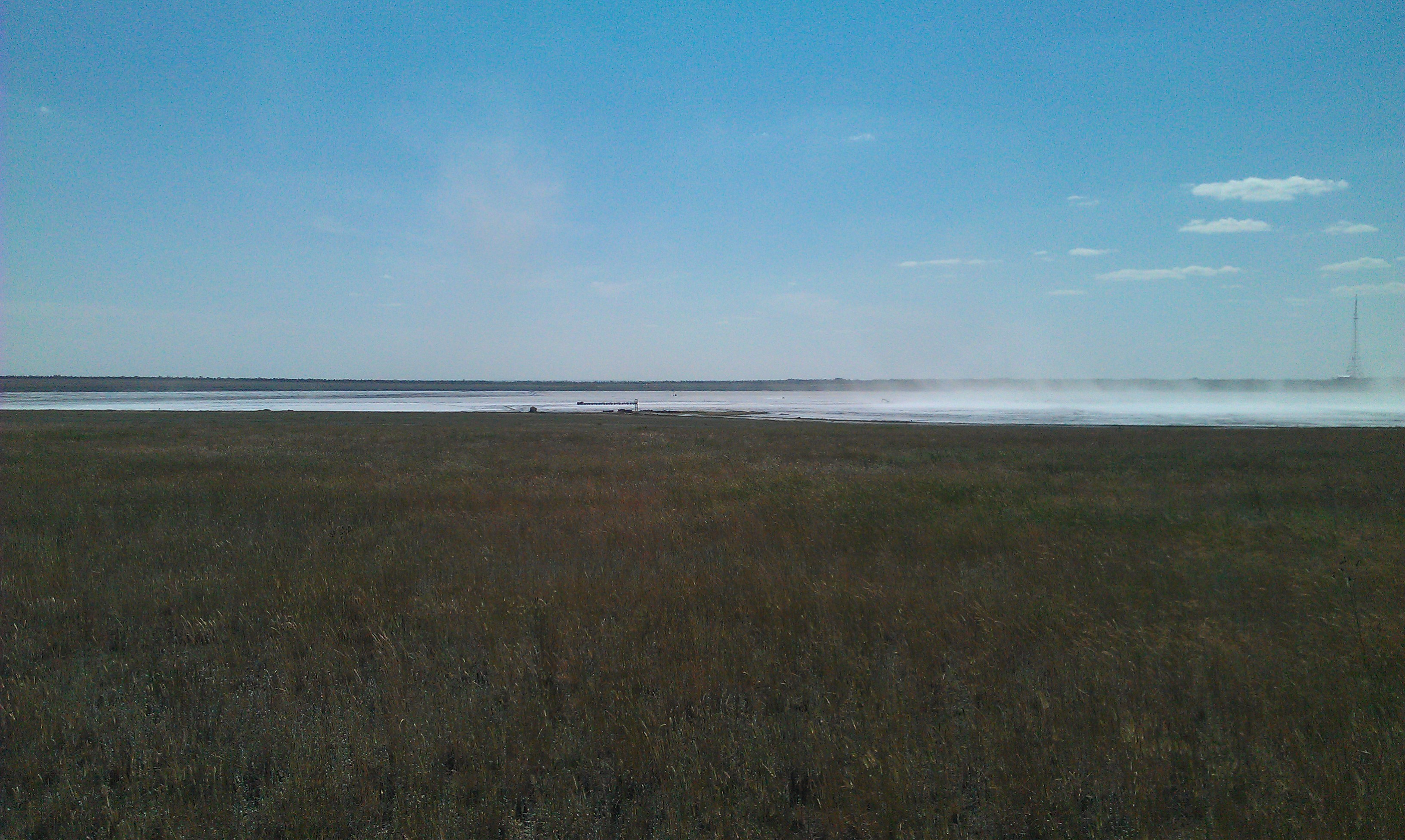 Кучуксульфат